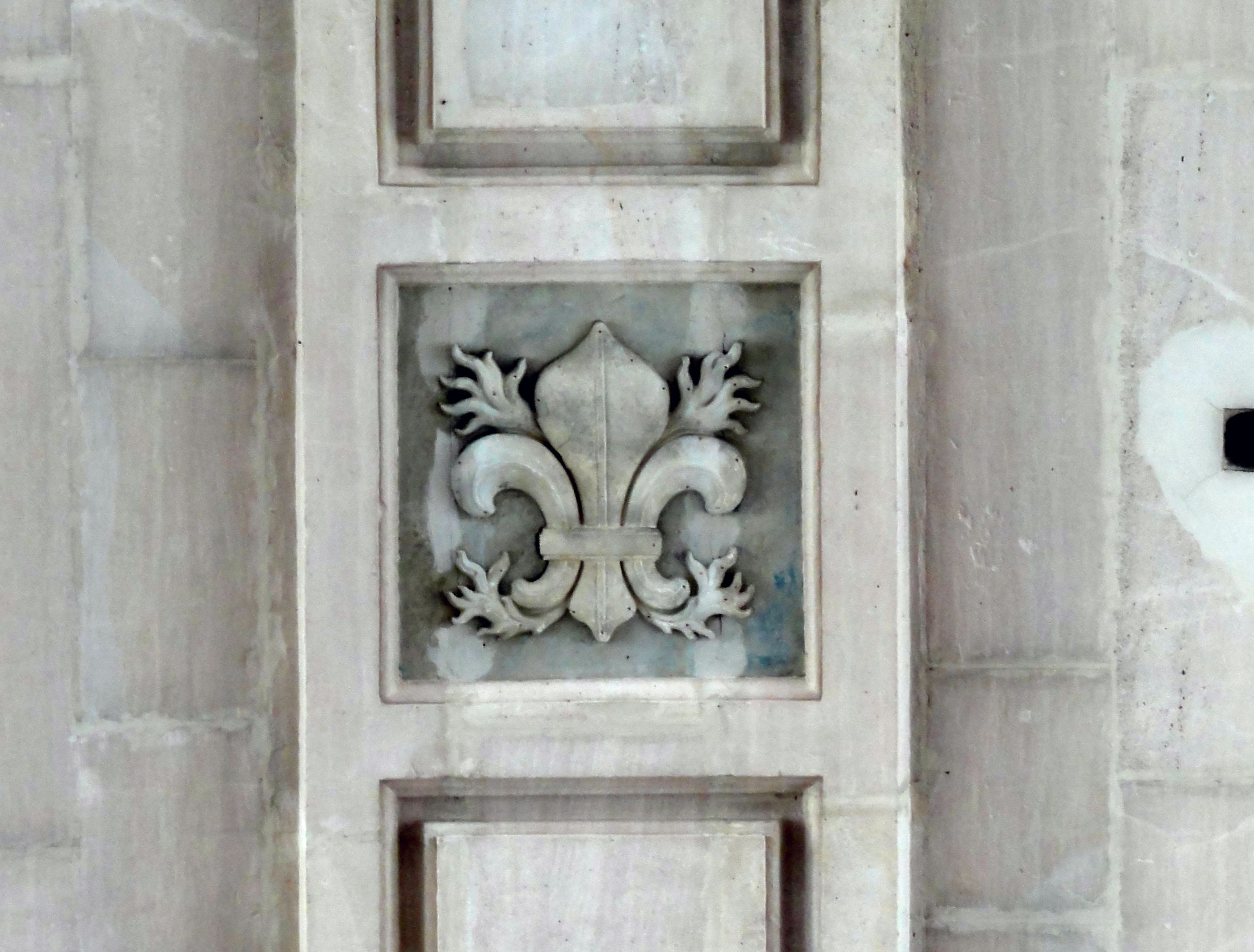 Ornement de la voûte.